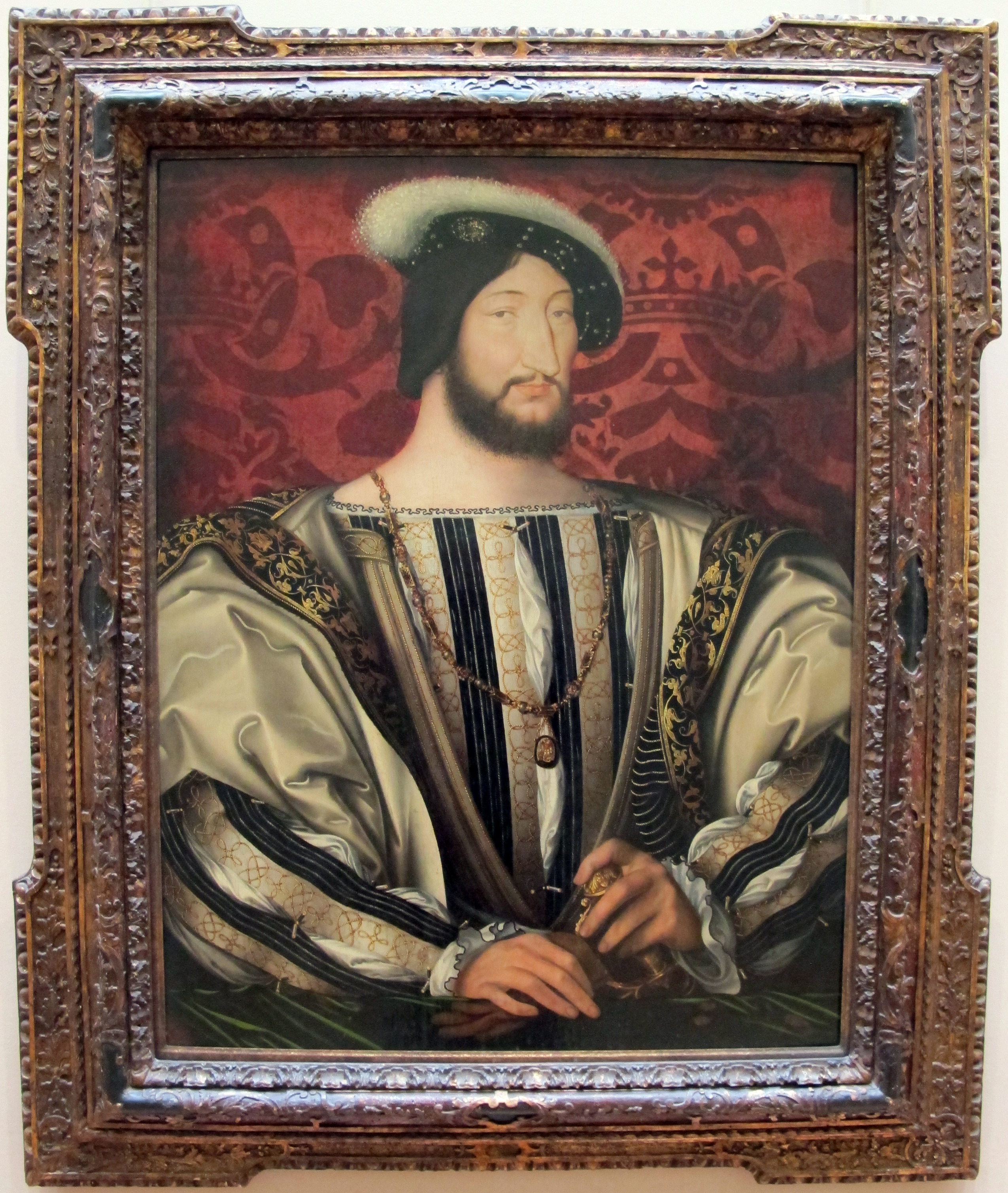 Pittura francese del XVI secolo, Louvre, Parigi